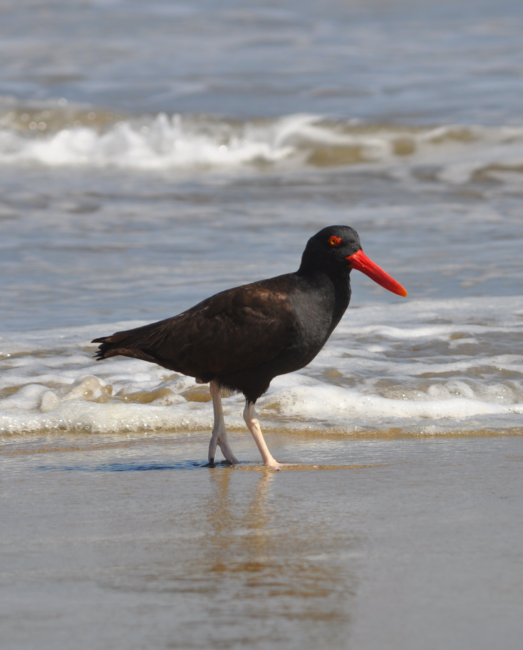 Haematopus ater, ostrero negro o pilpilén negro en la playa de Los Molles, V Región de Valparaíso, Chile.